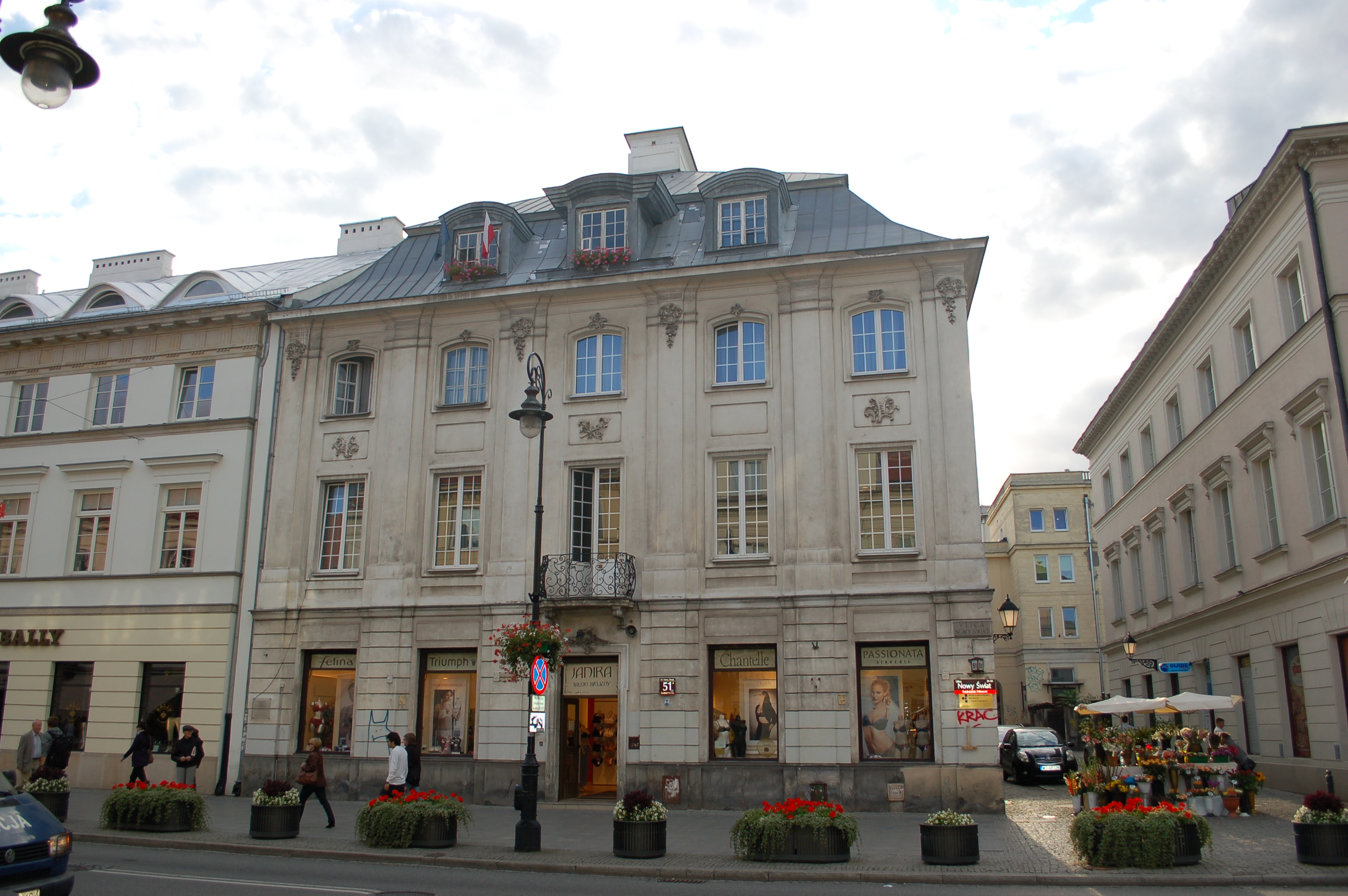 Nowy Swiat, Warschau